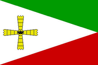 Bandera de Cubas de la Sagra, en Madrid (España)